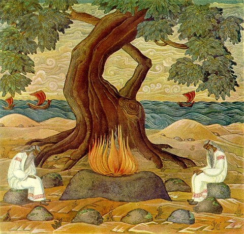 Н.К.Рерих. Вайделоты. 1914